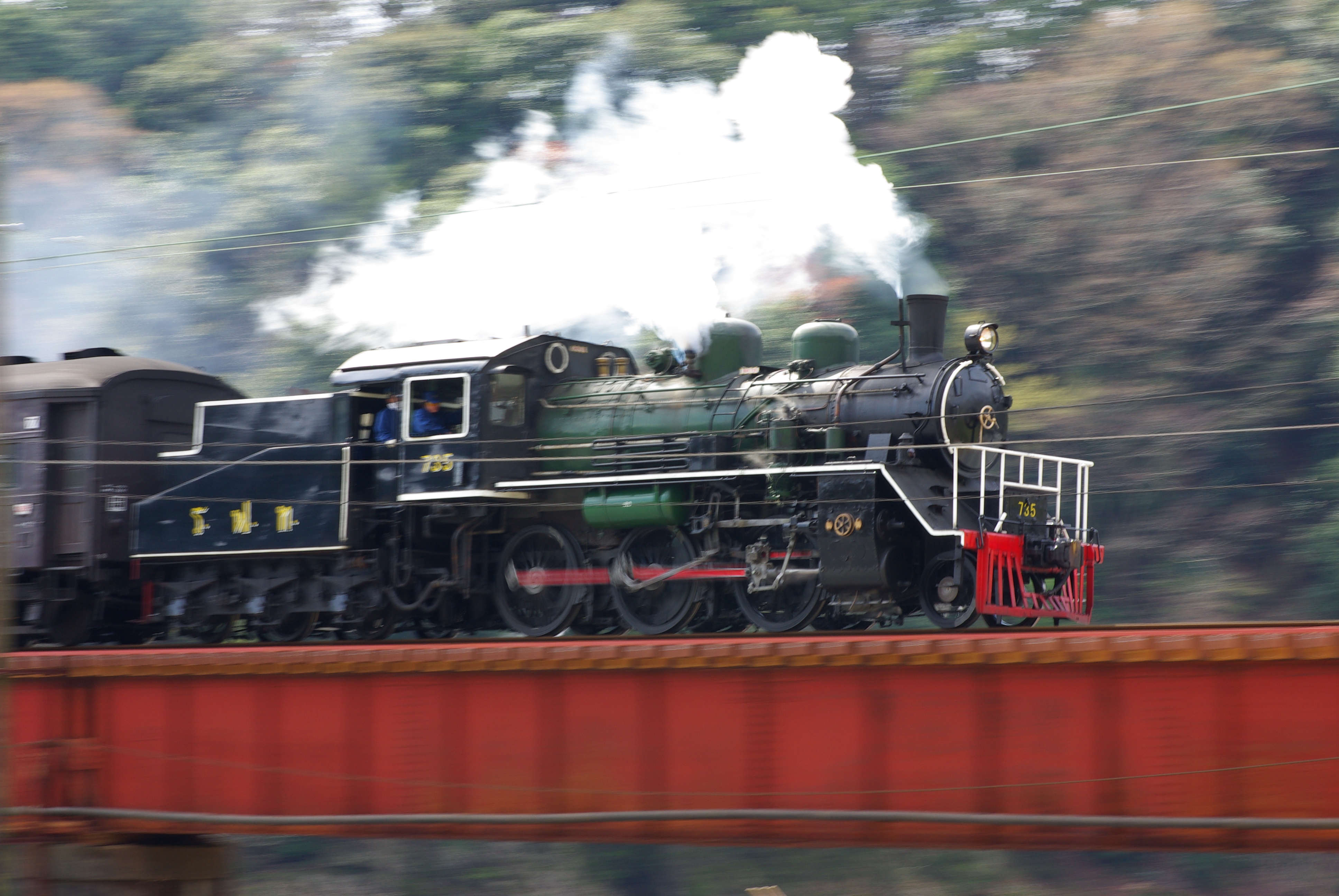 疾走するタイ国鉄仕様C56。大井川鉄道